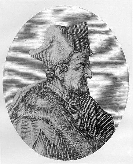 Lorenzo Valla Lorenzo Valla Lorenzo Valla (1405/1407-1457), neapolitański humanista, filozof, historyk